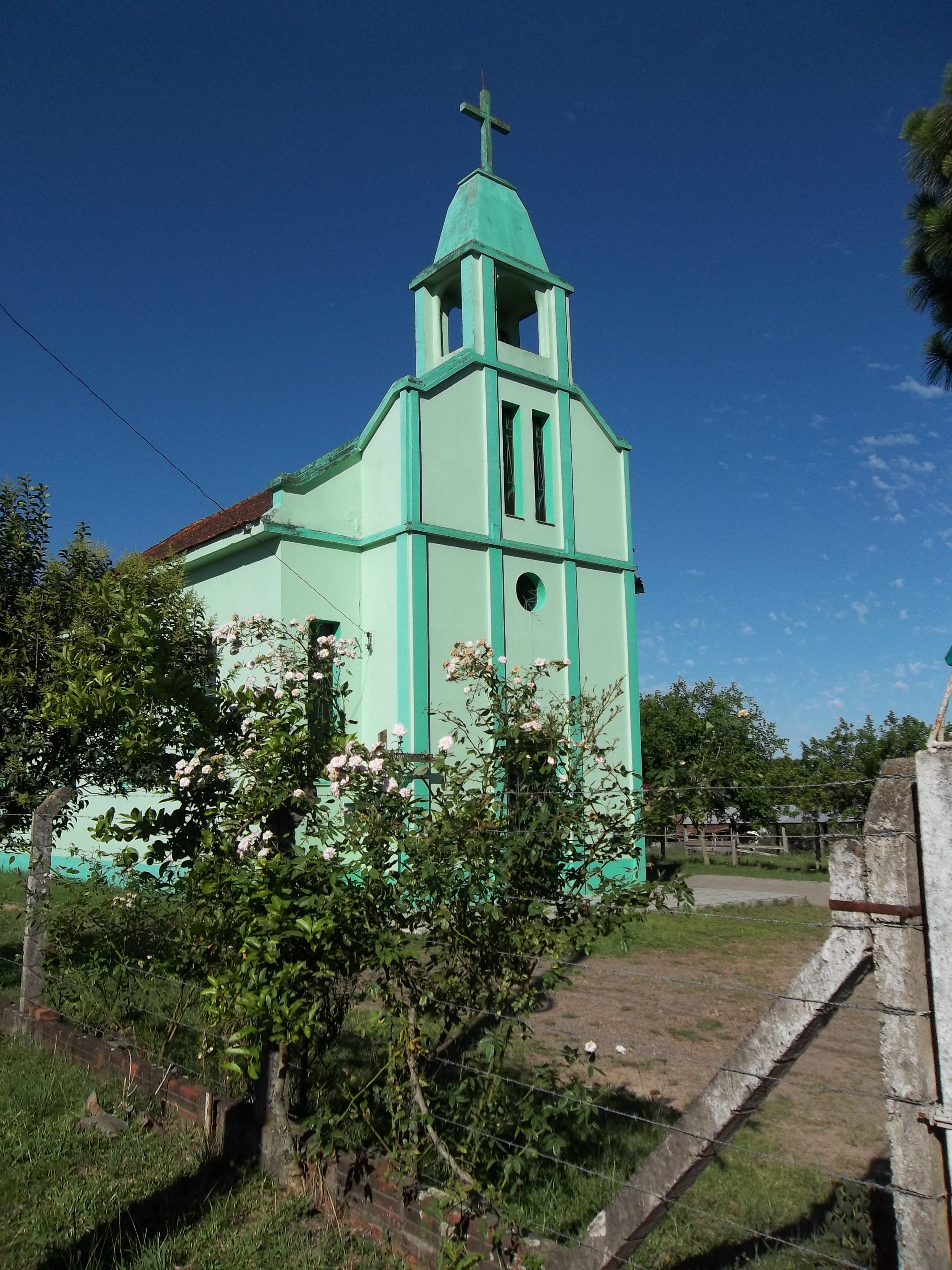 Igreja São José. São José, Sede, Santa Maria, Rio Grande do Sul, Brasil.